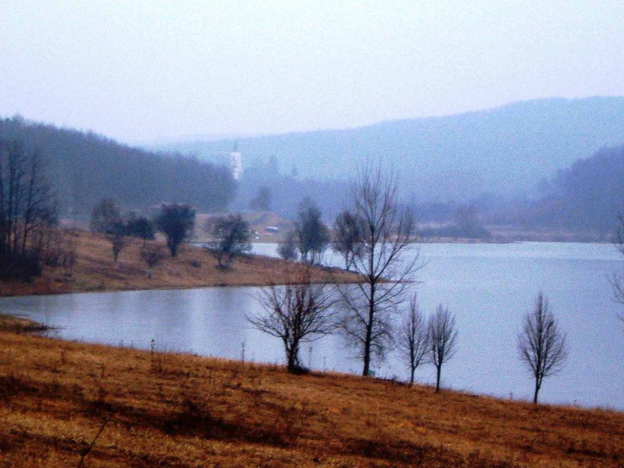 Szálka településen található tórendszer.